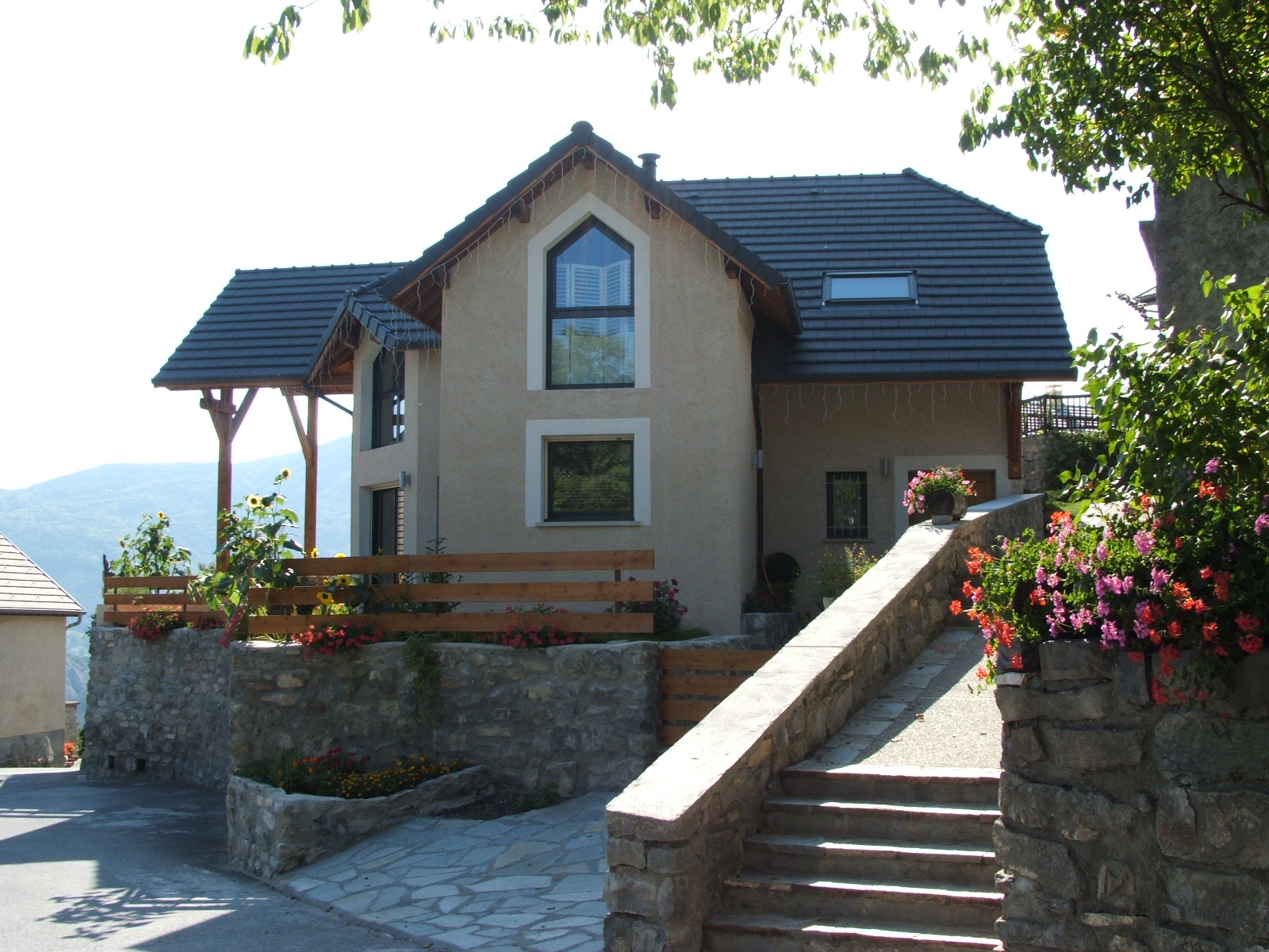 Le Sauze-du-Lac, Hautes-Alpes, France